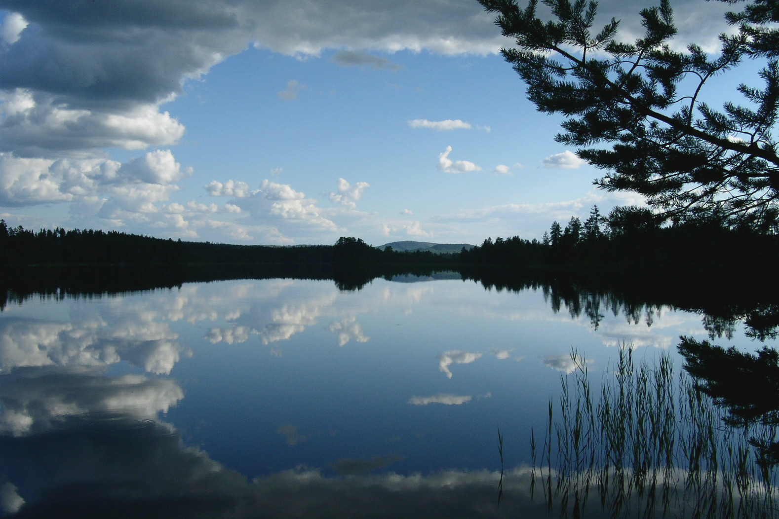 Käringsjön, Floda socken